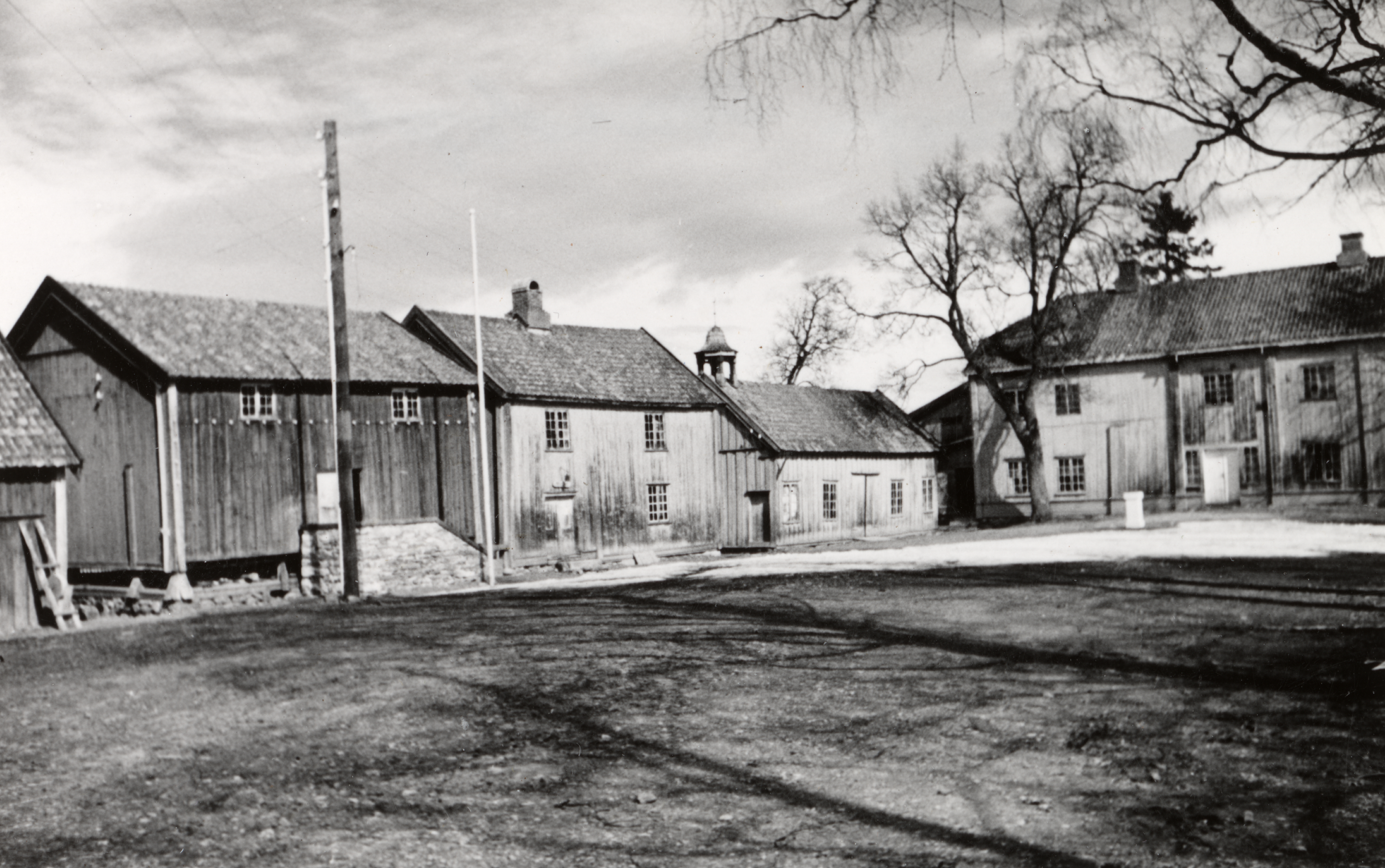 Stenberg i Vestre Toten, Oppland